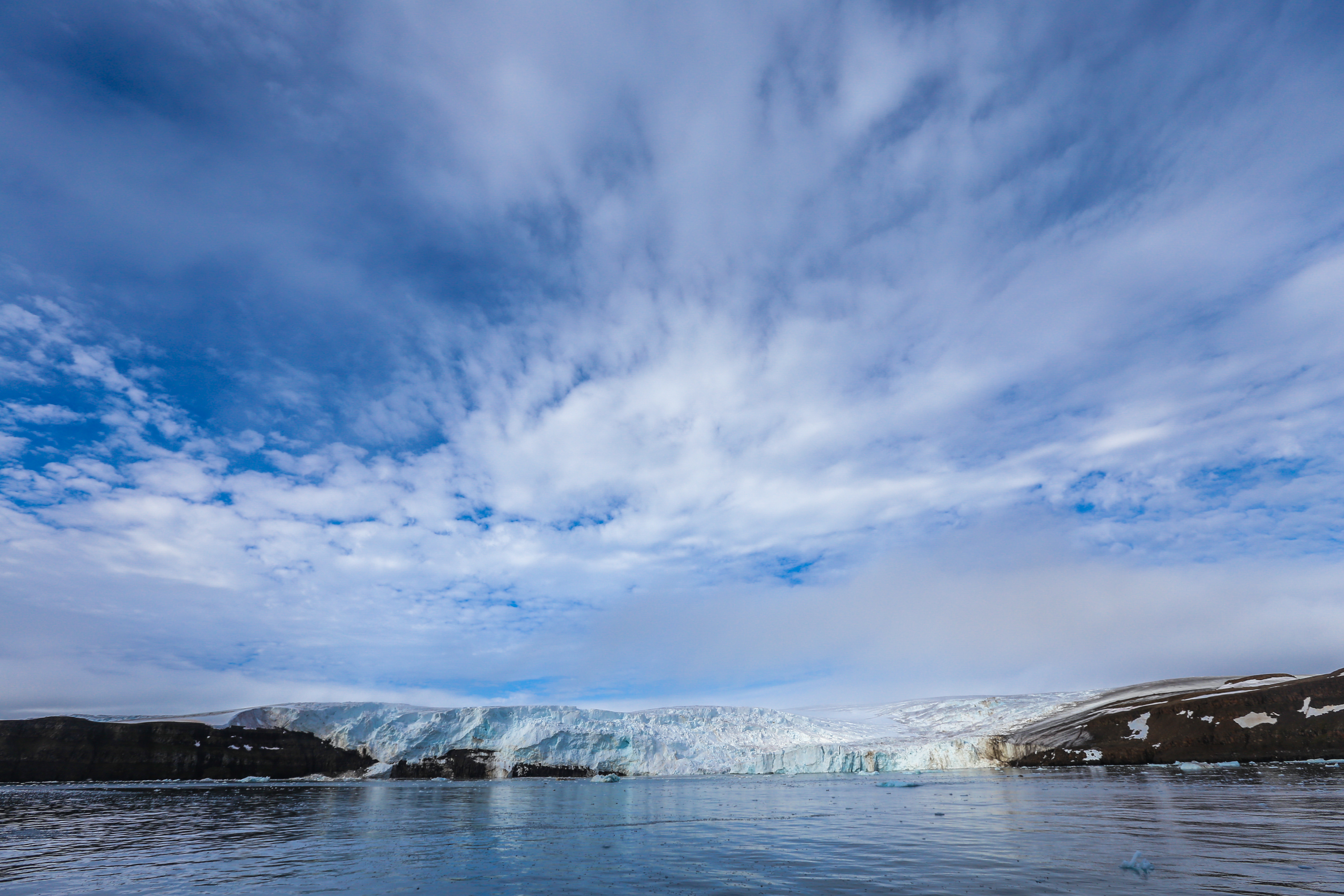 Комплексный заказник Земля Франца-Иосифа, Приморский район This image is related to the protected area of Russia number 2930163